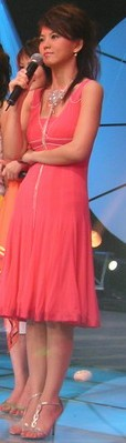 李湘（1976年2月10日－），湖南省岳阳人，著名主持人。